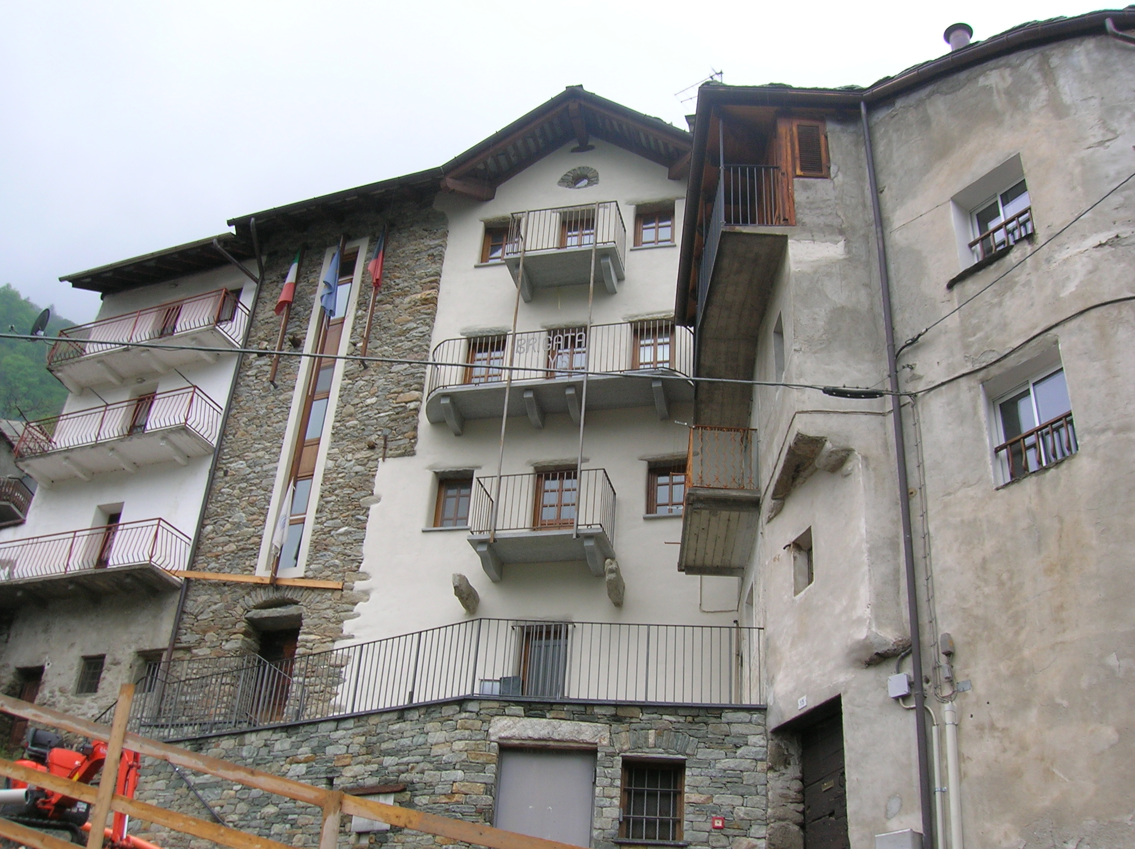 Centro di documentazione e Museo della resistenza "Brigata Lys", Perloz, Valle d'Aosta, Italia.